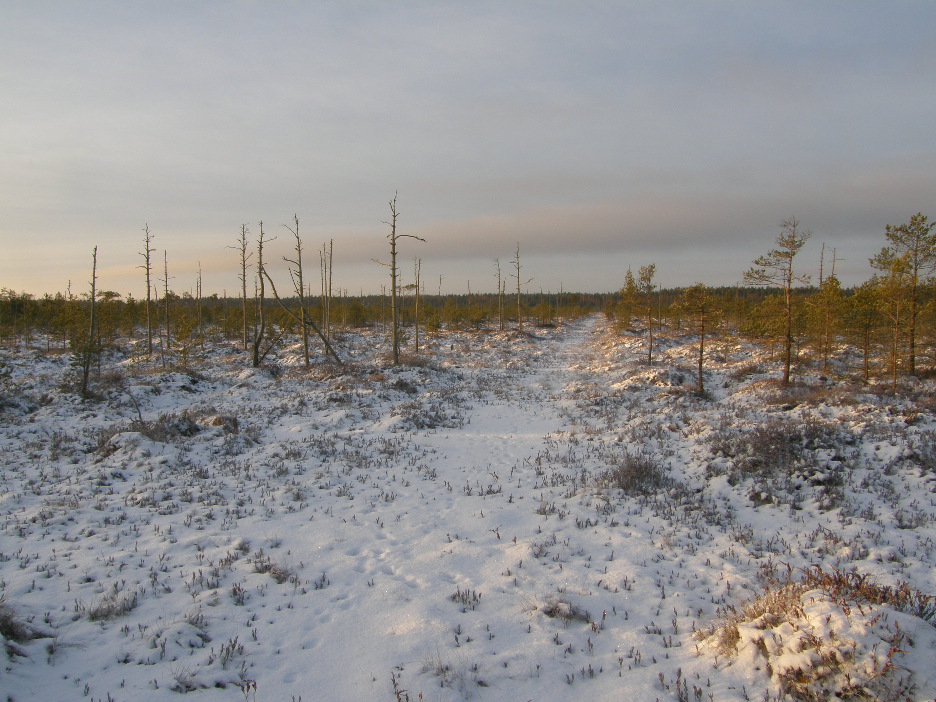 Болото Лиелсалас зимойLatviešu: Lielsalas purvs ziemā